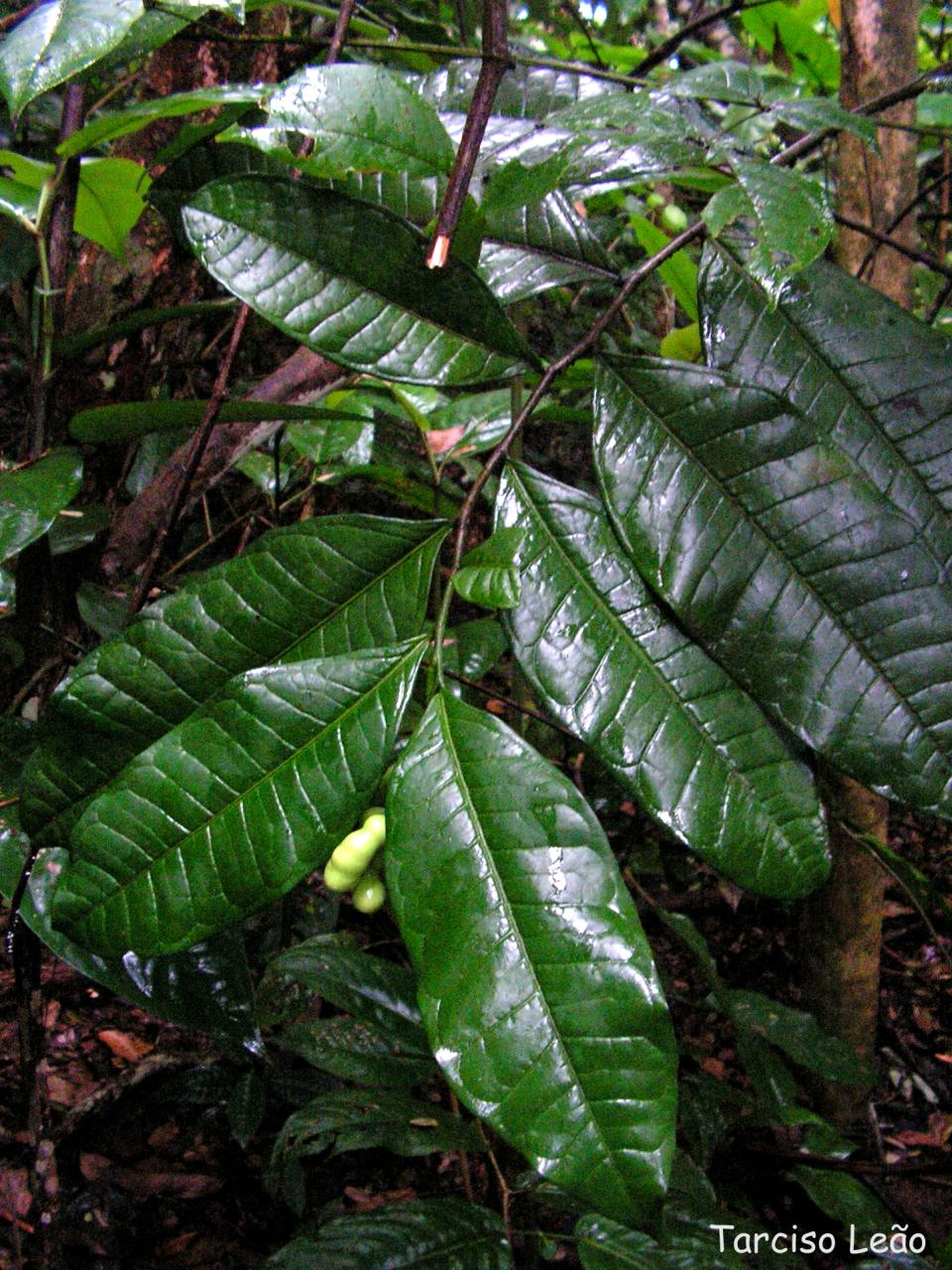 Annonaceae – Cymbopetalum brasiliense (Vell.) Benth. ex Baill. – arvoreta de subbosque – RPPN Pedra D'Anta, Serra do Urubu – Lagoa dos Gatos – Pernambuco – Brasil.